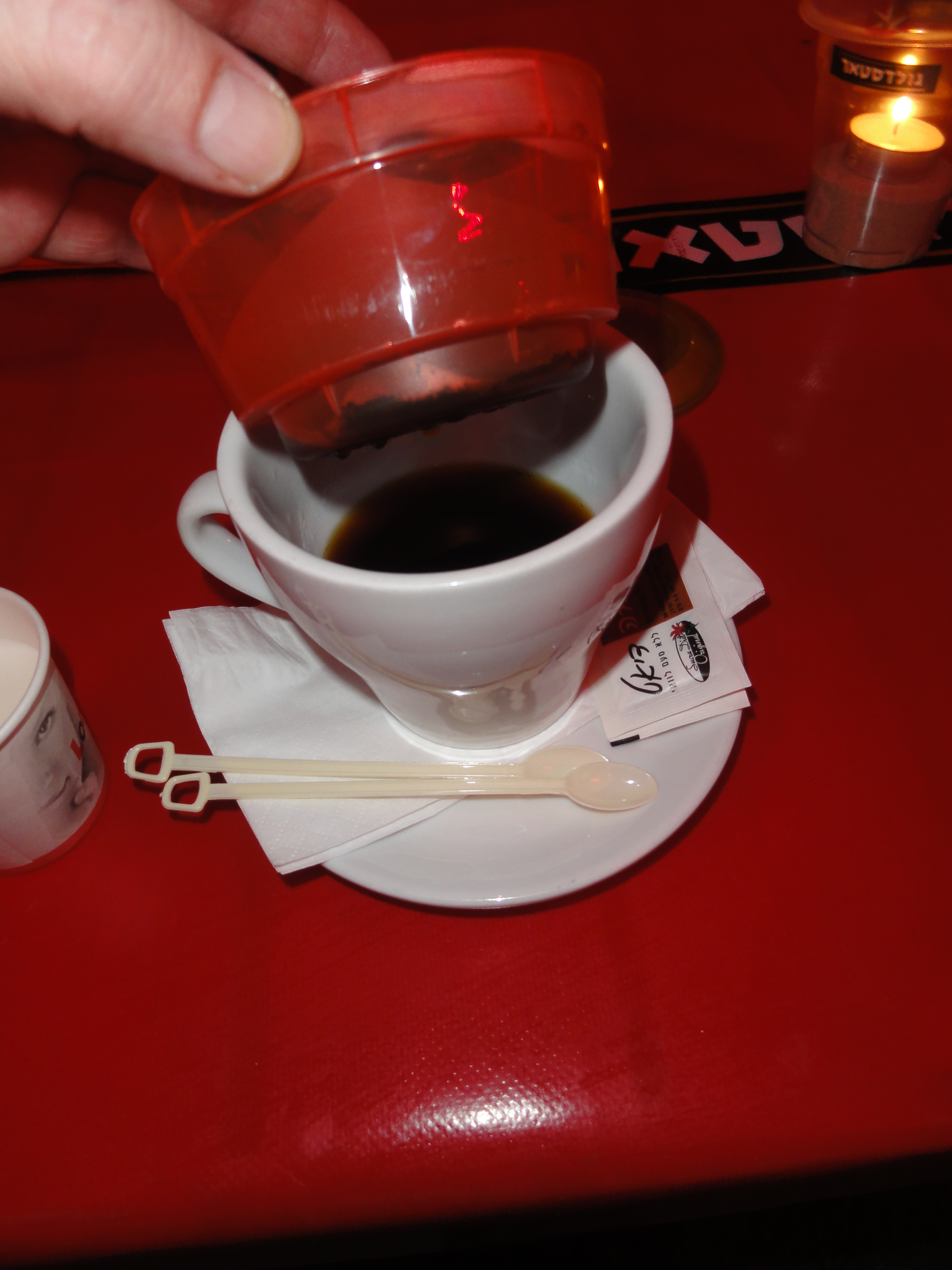 Tel Aviv — Paßgenauer Kaffeepulverfilter für eine Tasse frisch gebrühten Kaffee im “La Mer Beach Restaurant”